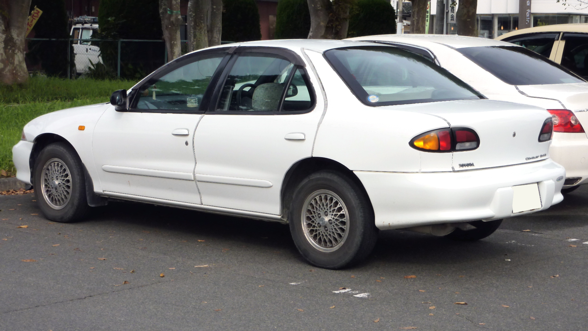 トヨタ・キャバリエセダン（リア）